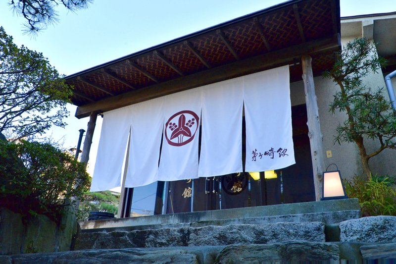 神奈川県茅ケ崎市の茅ヶ崎館 玄関